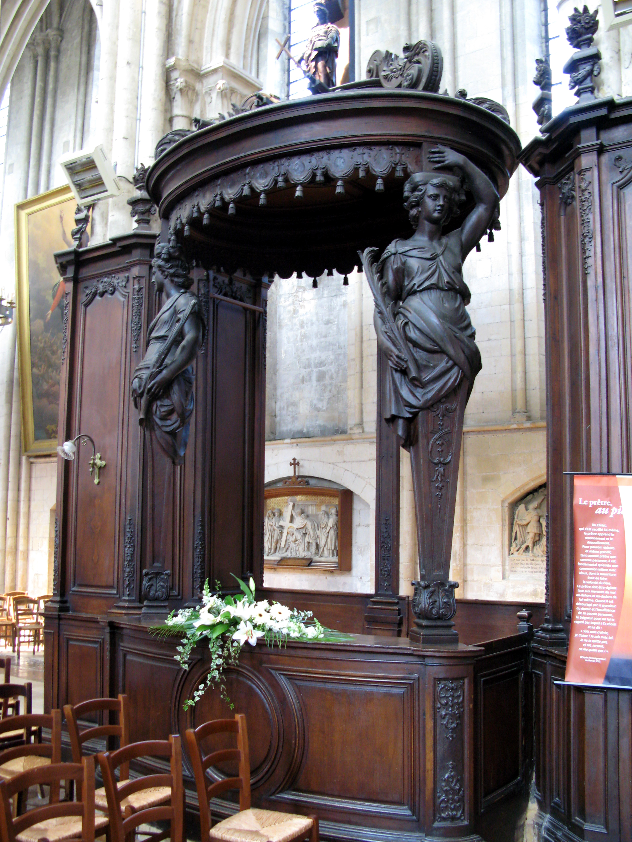 Eu (Seine-Maritime, France) - Le banc d’œuvre de la collégiale, sculpté par Adrien Le Jeune d'Abbeville en 1731. .